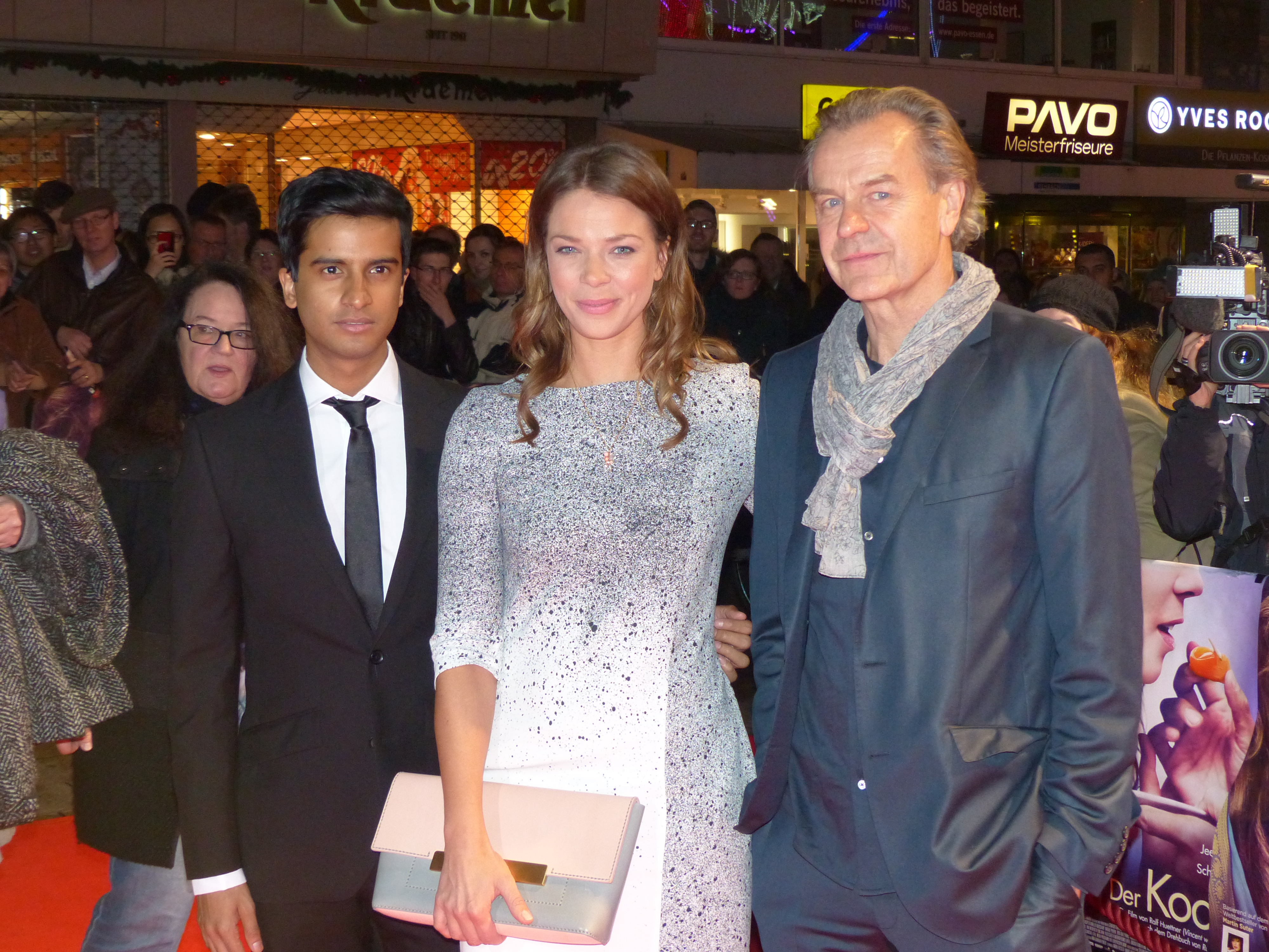 Hamaz Jeetooa, Jessica Schwarz und Ralf Huettner (Regie) bei der Premiere von "Der Koch", November 2014